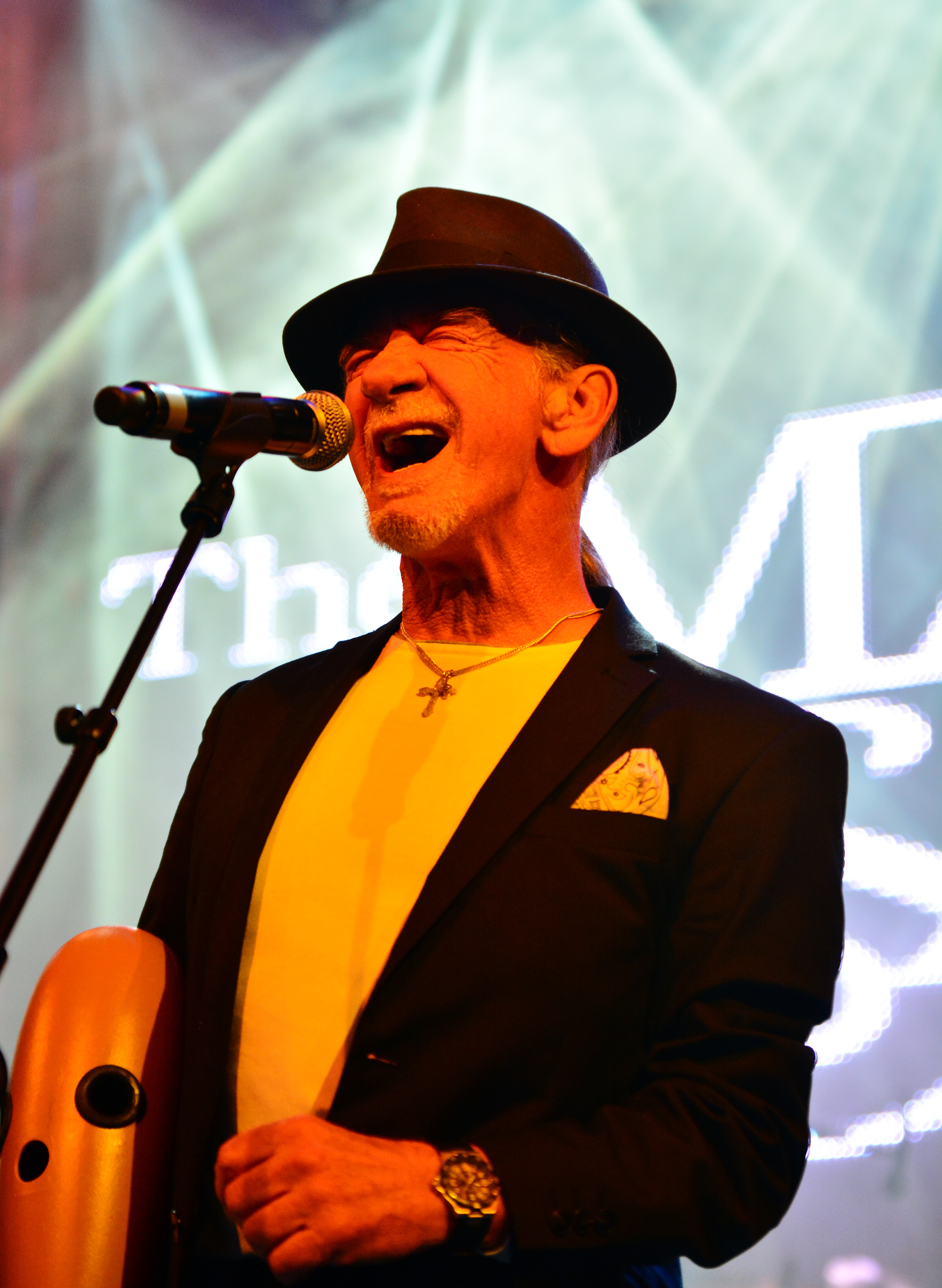 Alex Ligertwood beim NDR Hafengeburtstag in Hamburg